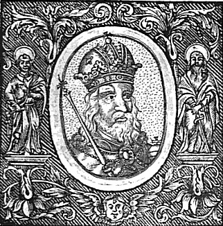 Karel IV.